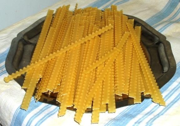 Mafaldine